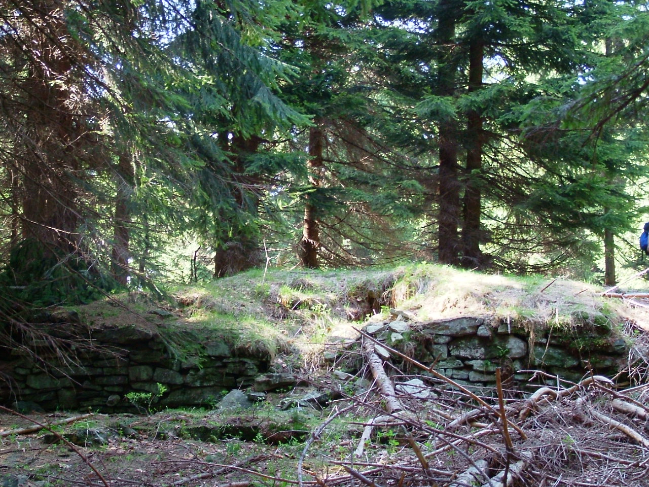 Ruiny schroniska na Trzech Kopcach w Beskidzie Slaskim.jpg